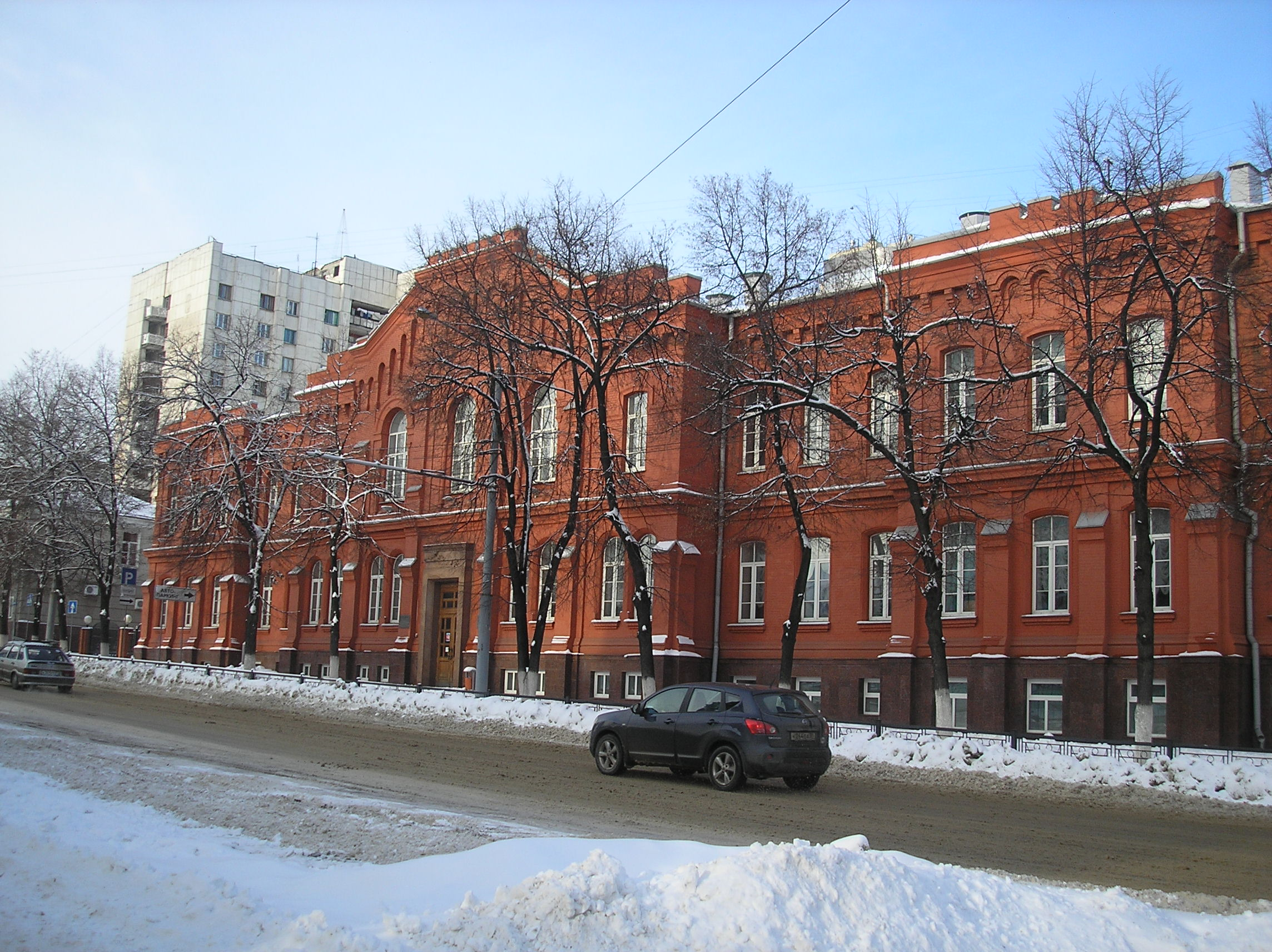 Социально-Теологический факультет БелГУ, бывшее здание мужской гимназии